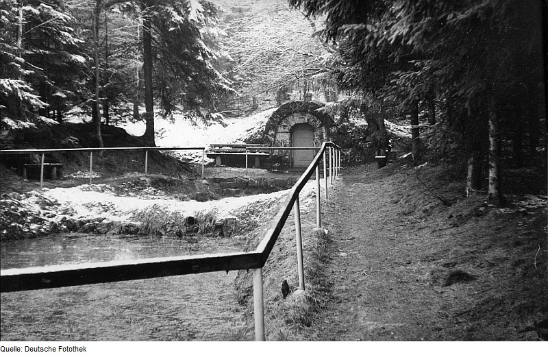 Original image description from the Deutsche FotothekTharandt-Grillenburg. Warnsdorfer Quelle zwischen Grillenburg und Tharandt